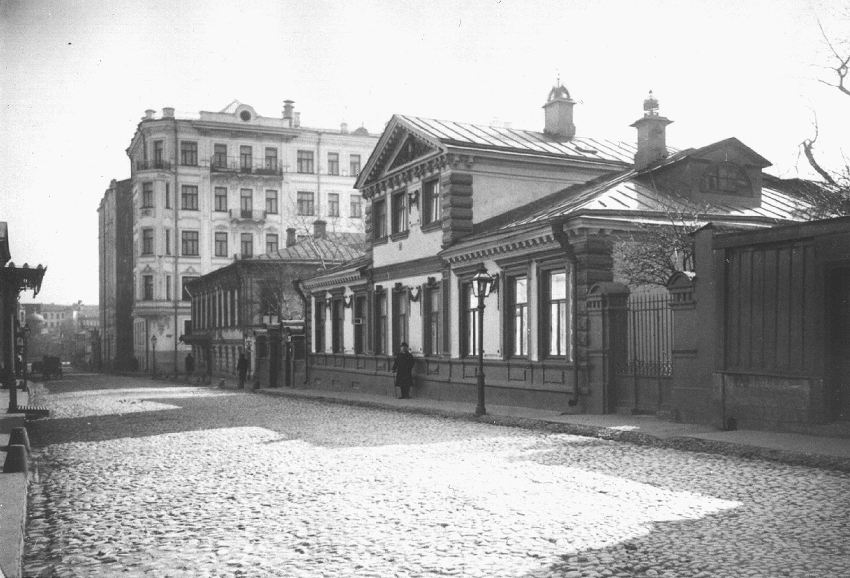 Фотография дома-музея Герцена по адресу Сивцев Вряжек, 27, конец XIX - начало XX века